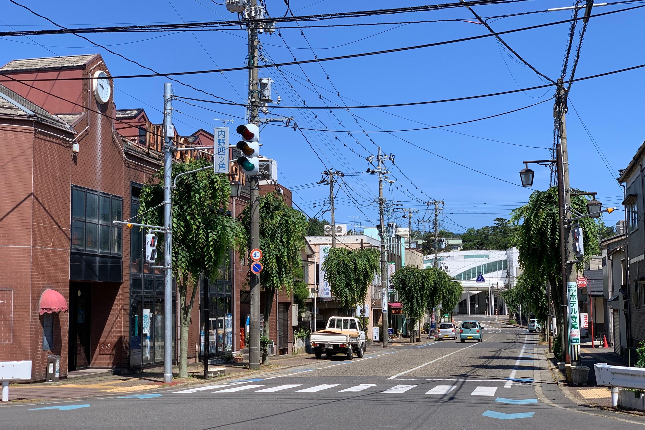 「内野四ツ角」交差点から内野駅方向を望む（新潟市西区，2020年6月）新潟県道140号内野停車場線